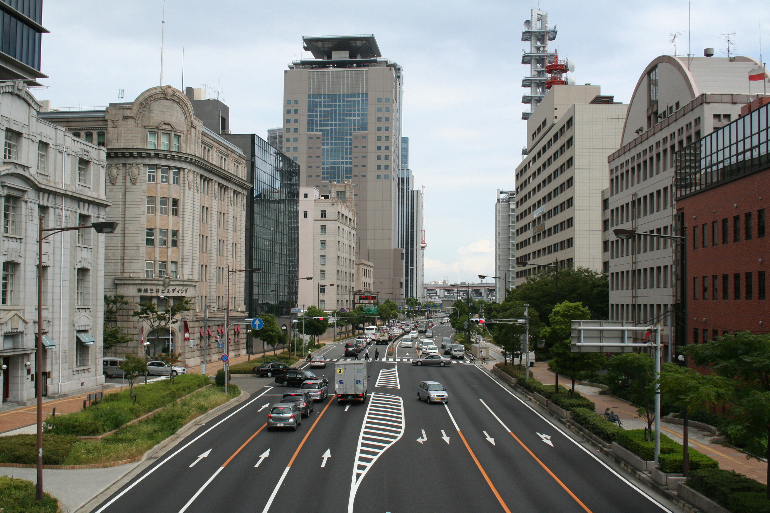 兵庫県神戸市中央区にある神戸市立博物館やその南を通る国道2号線(海岸通)沿いの町並み。 メリケン波止場前交差点にある歩道橋から国道2号線を東方向に向かって撮影。